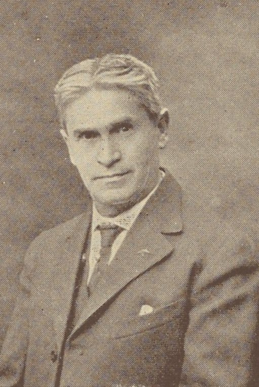 Partoprenantoj de UK 1912 el la albumo VIII. Universala Kongreso Esperantista.